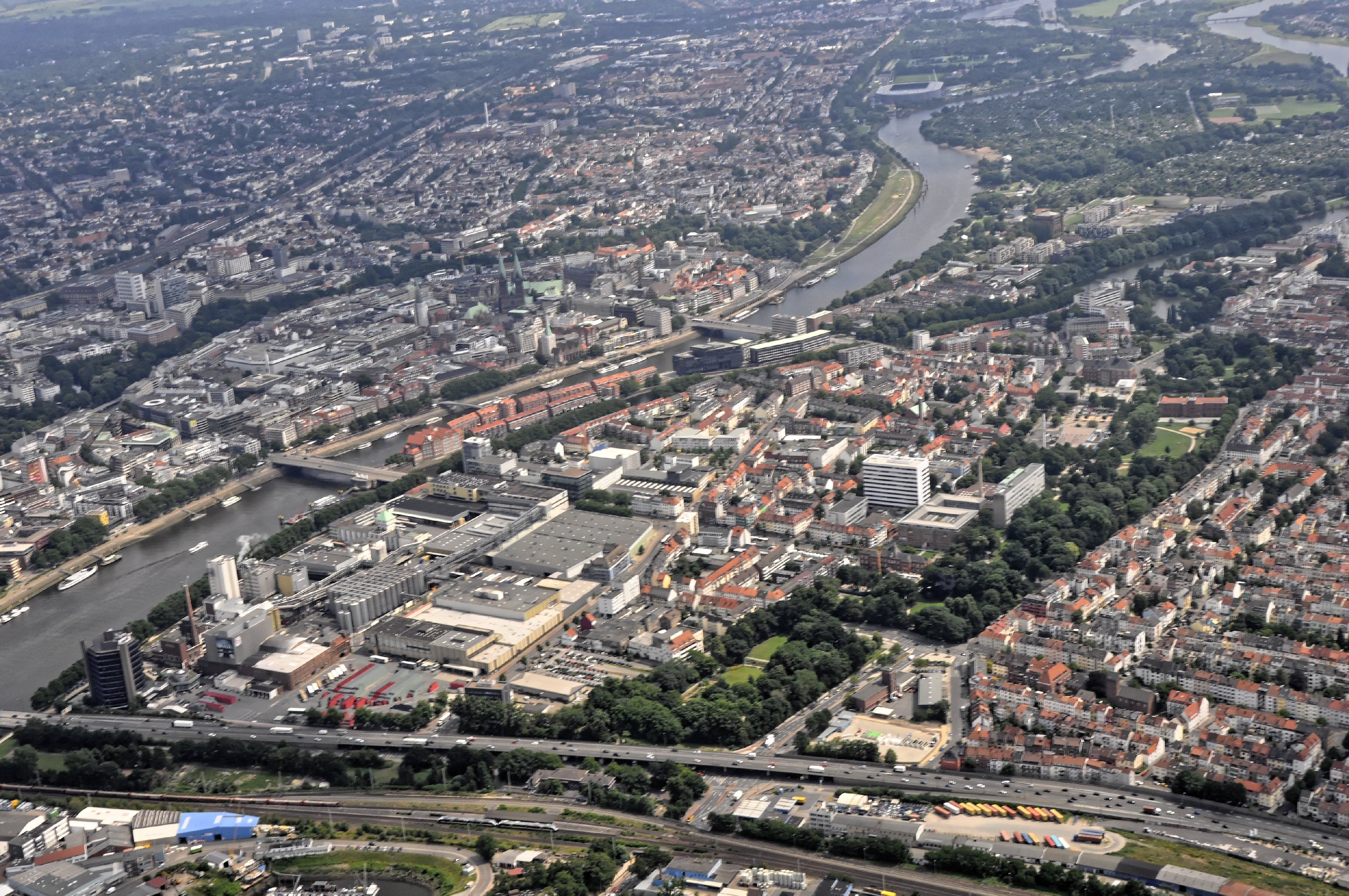 Bilder vom Flug Nordholz Hammelburg 2015: Die Brauerei Beck (vorn links) in Bremen.